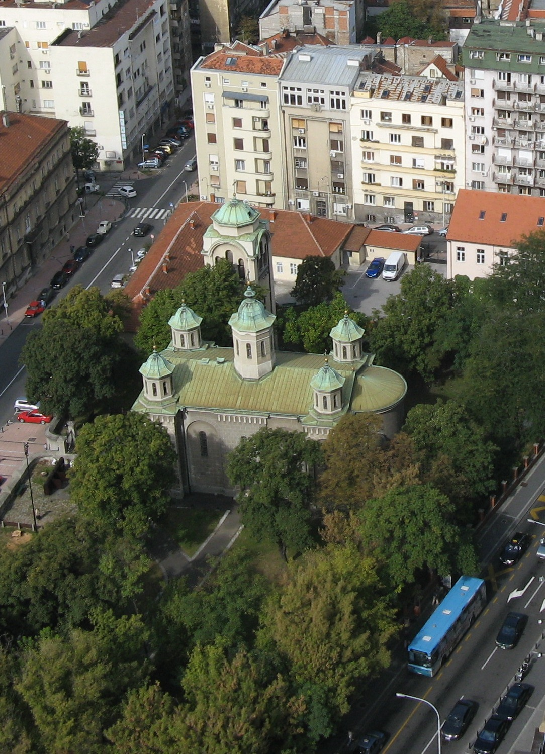 Црква Вазнесења Господњег налази се у улици Адмирала Гепрата у Београду. Подигнута је 1863. године и обликована у духу тада преовлађујућег романтизма, по угледу на старе српске манастире. У споменик културе уврштена је 1967. године.